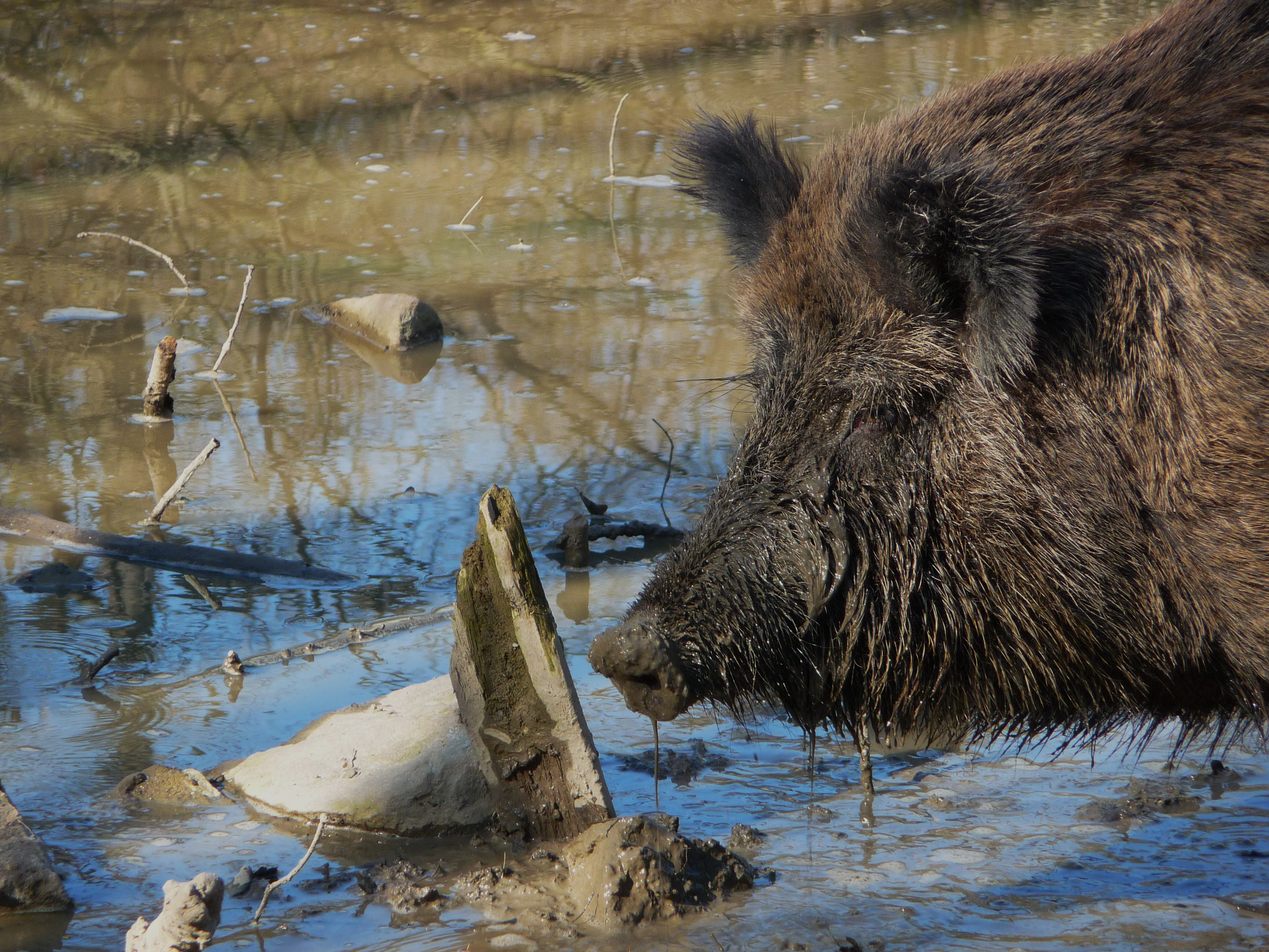 Im Schlamm nach Futter suchendes Wildschwein (Sus scrofa)